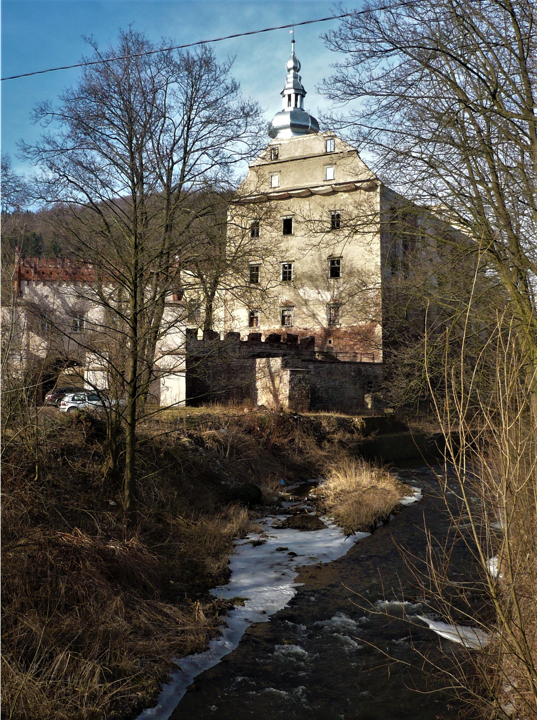 Zamek w Sarnach